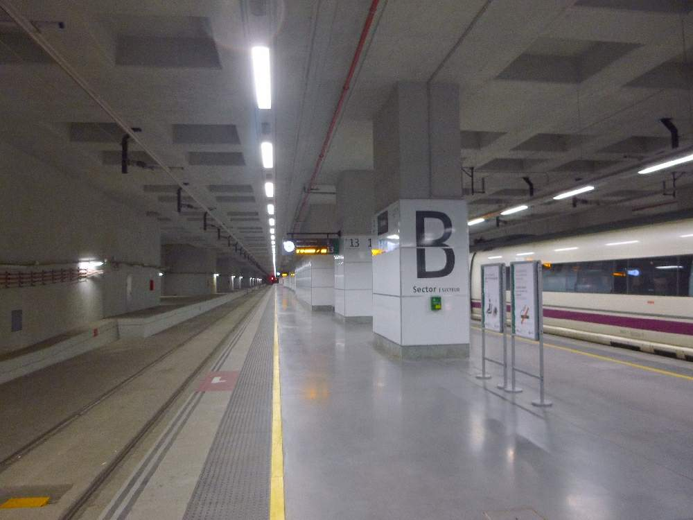 Girona - Estación de ADIF